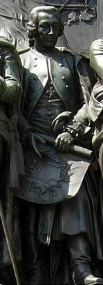 August Wilhelm, Prinz von Preußen, Bruder Friederichs II. und Vater Friedrich Wilhelms II., Detail (Ostseite, Vorderansicht) am Denkmal Friedrichs II. von Christian Daniel Rauch Unter den Linden in Berlin-Mitte (G.D.K. in der Unterschrift bedeutet General der Kavallerie). Der Offizier rechts vom Beschauer, Oberst Heinrich Sigismund von der Heyde, hält einen Plan der Festung Kolberg in der Linken (er hat die Festung im Siebenjährigen Krieg gegen russische Truppen verteidigt)